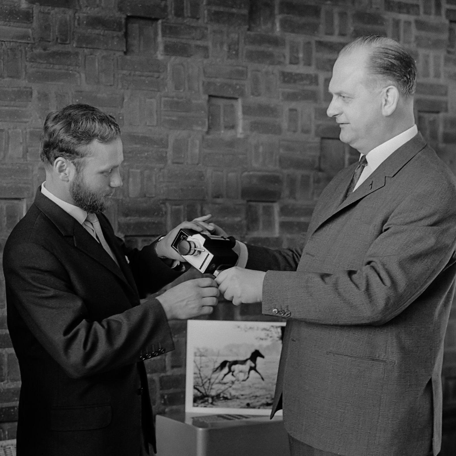 World Press Photo Prijs uitgereikt aan fotograaf Peter Thomann , Peter van Breukelen overhandigt de prijs (rechts) 27 april 1964